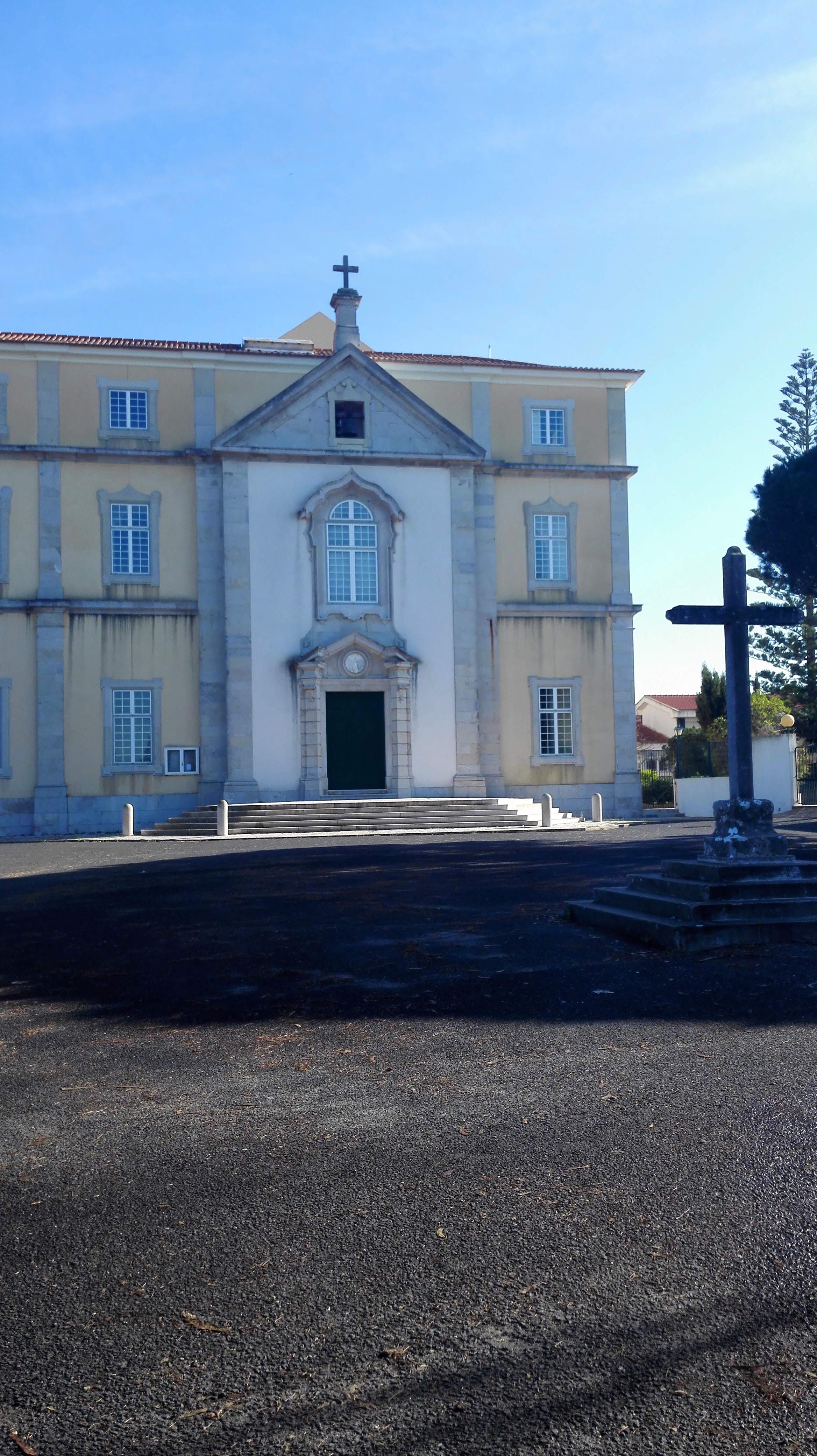 Neues Kloster